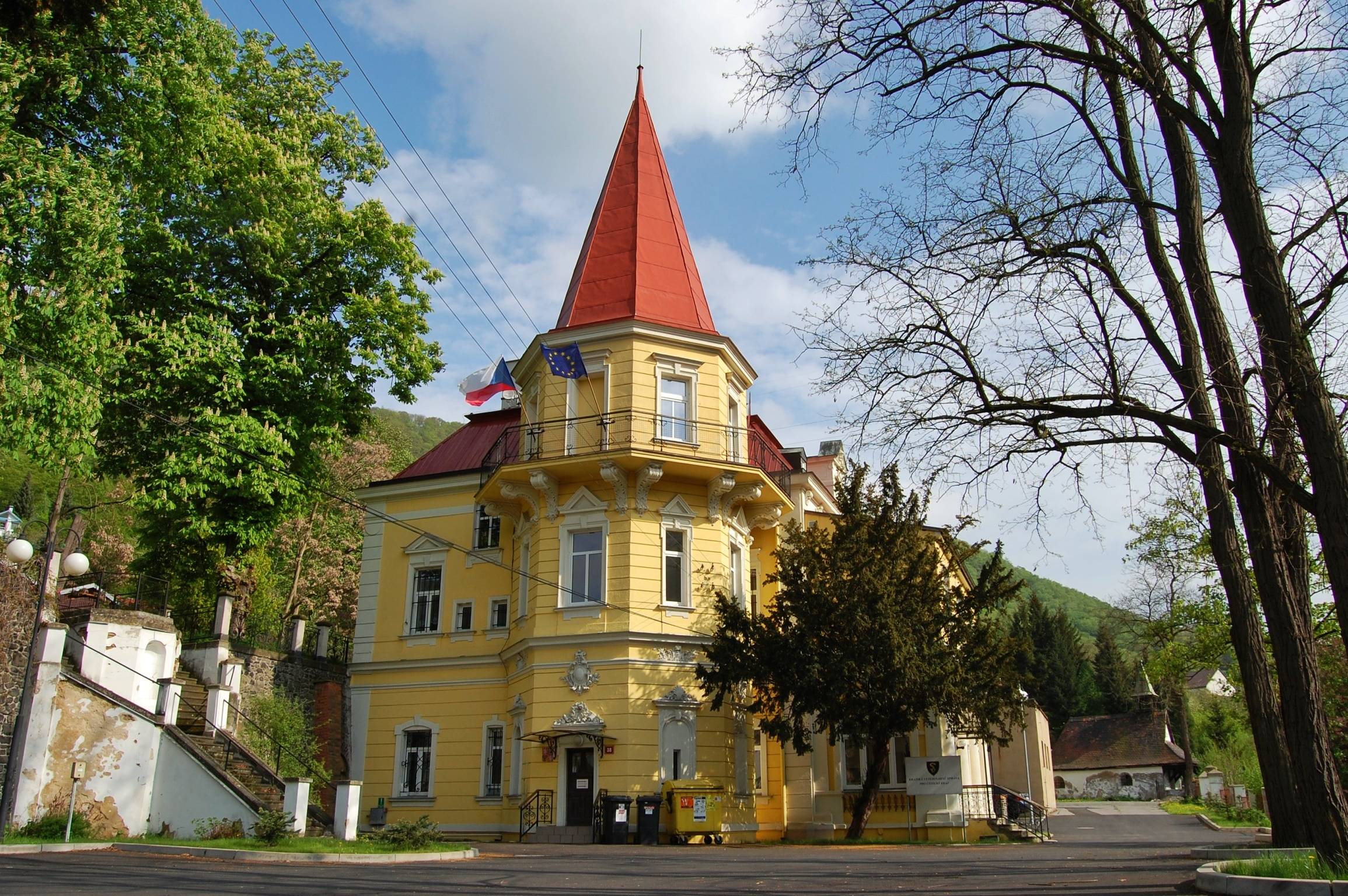 Zámeček v Brné, sídlo Krajské veterinární správy Státní veterinární správy ČR pro Ústecký kraj. Vpravo v pozadí je kaple Povýšení svatého Kříže.